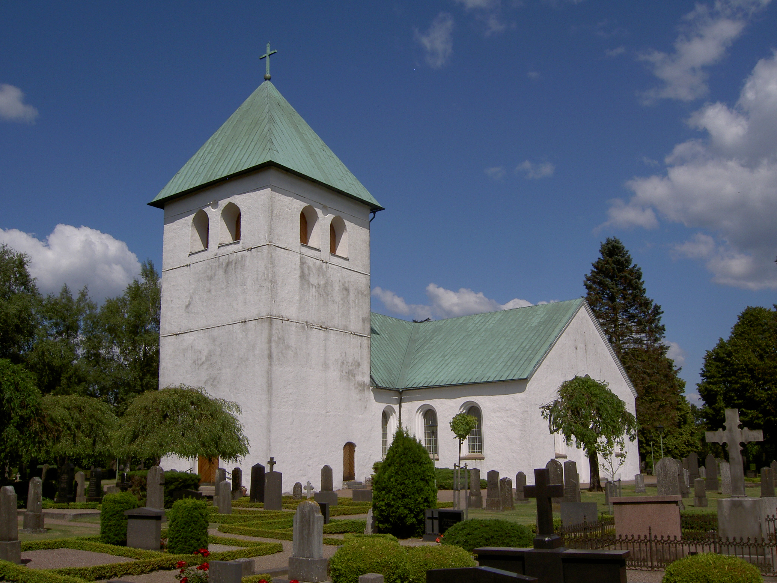 Munka-Ljungby kyrka från sydväst